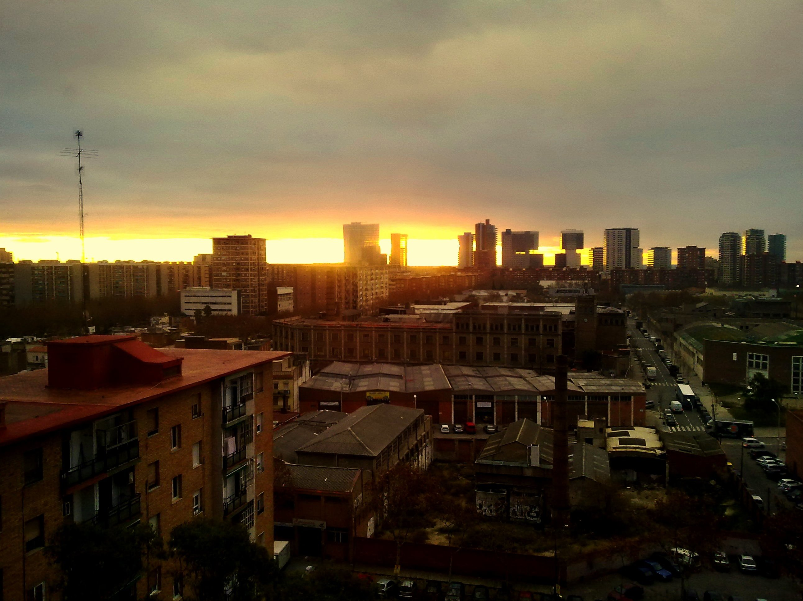 Sant Martí de Provençals, Barcelona, Spain